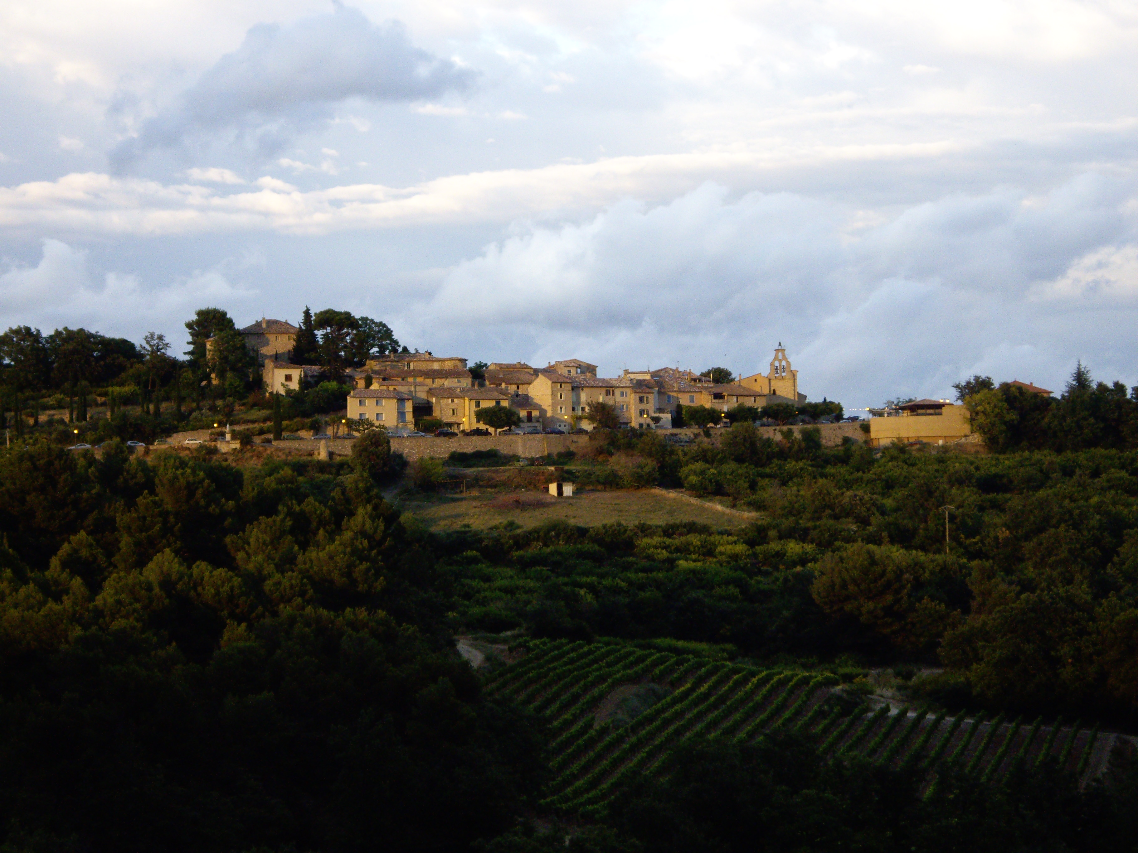 Blauvac